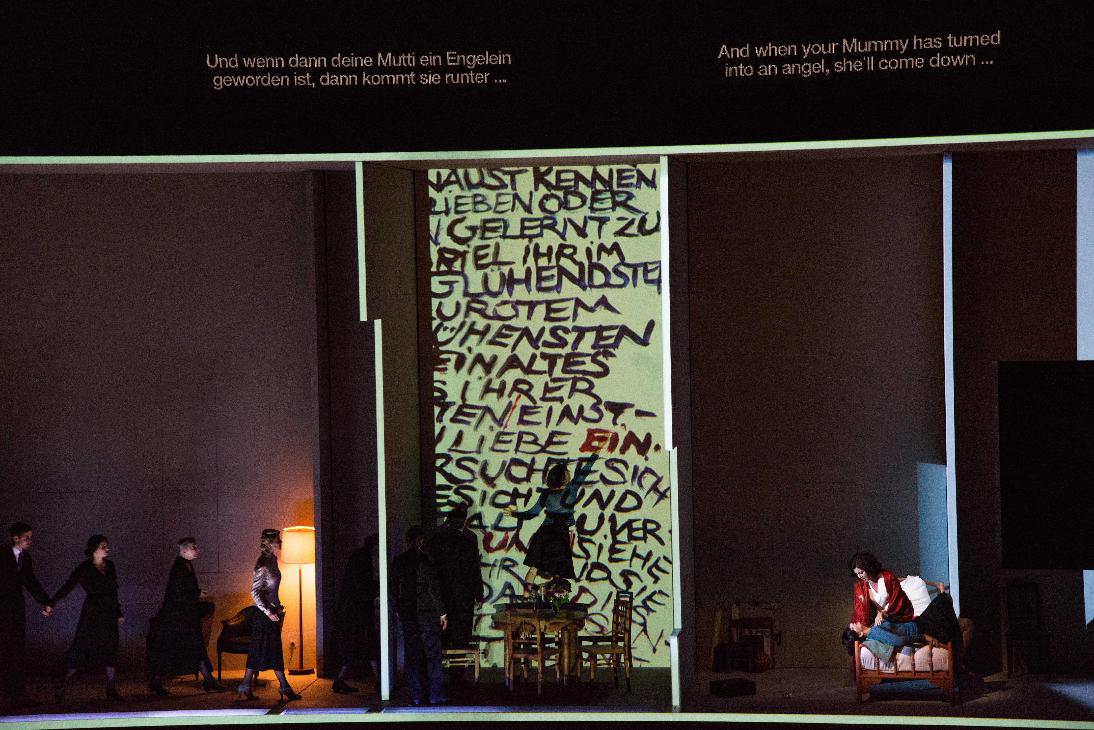 Charlotte Salomon, opera by Marc-André Dalbavie, Salzburg Festival, 2014